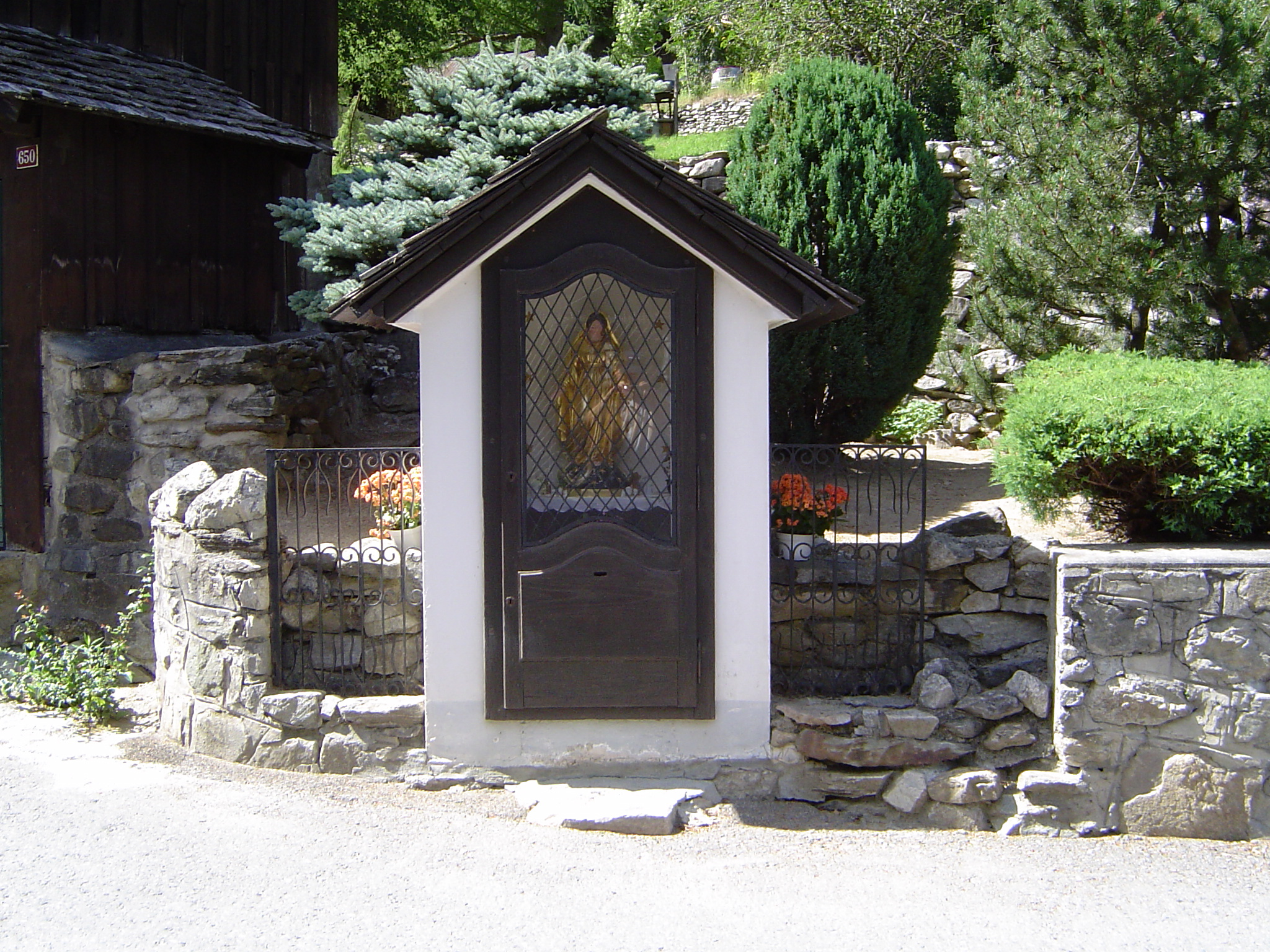 Photos prises dans la commune de Chamonix-Mont-Blanc